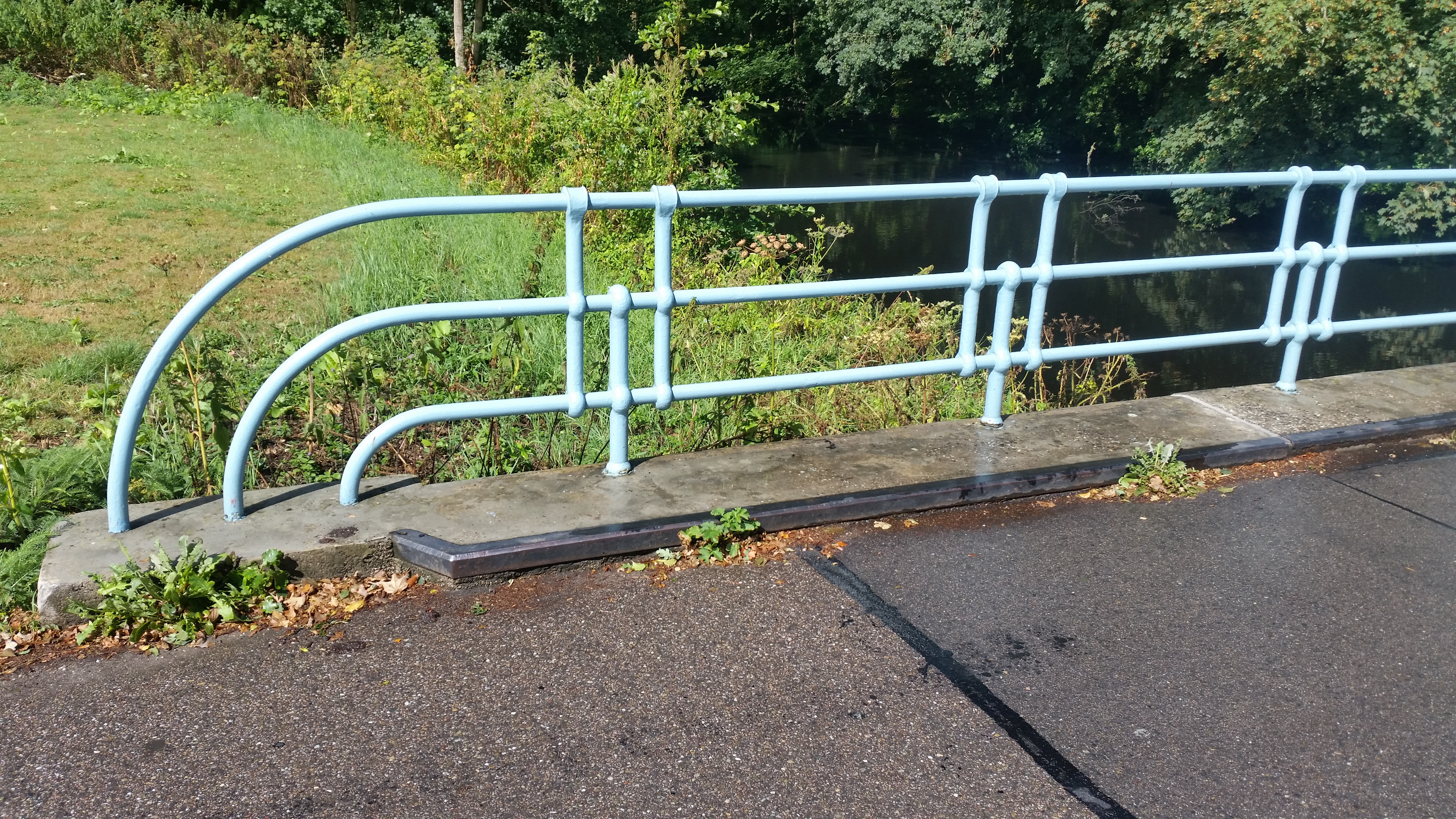 Brug 527 (in Amsterdam), brugleuningen buigen af de grond in